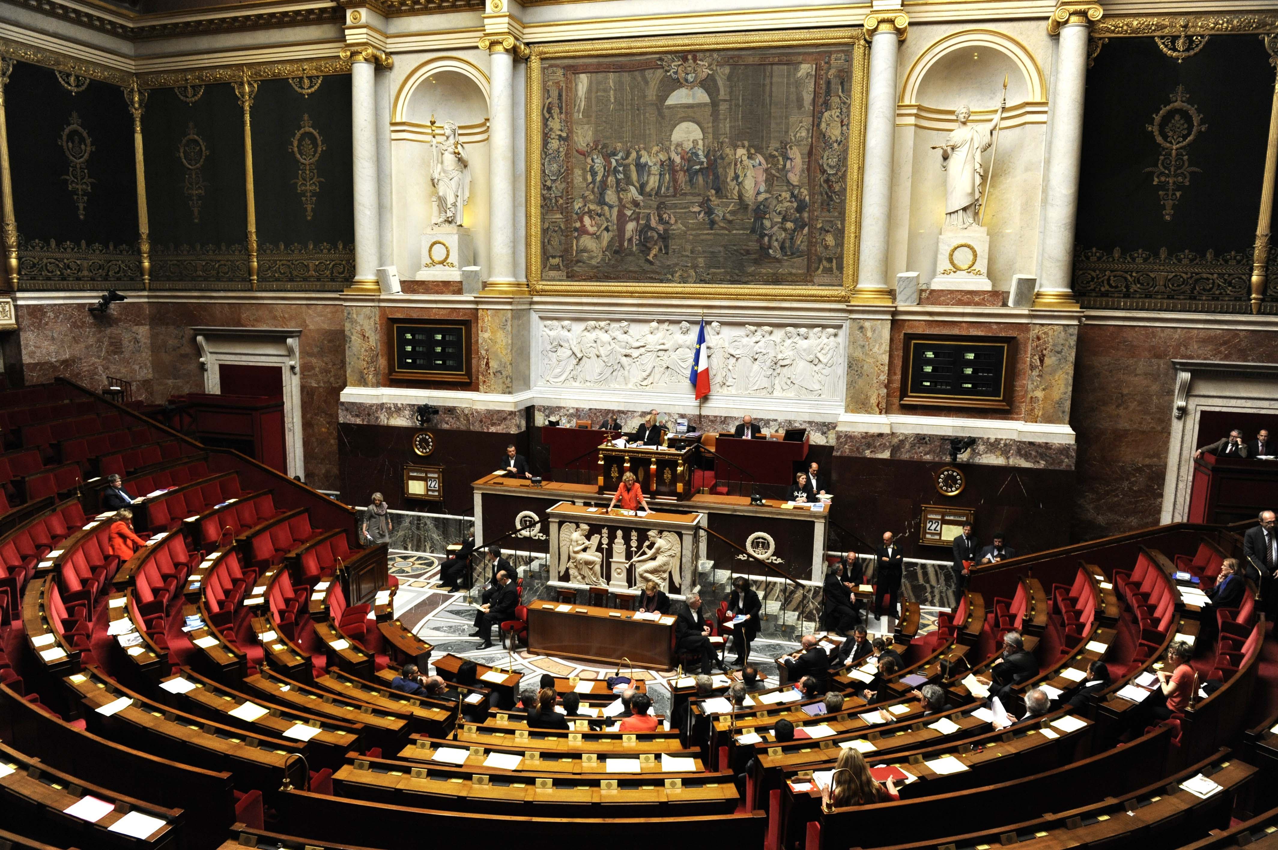 Genevièvre Fioraso presente le projet de loi relatif a l'enseignement supérieur et à la recherche à l'Assemblée Nationale